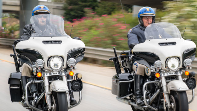 California Highway Patrol Motorcycle Officers